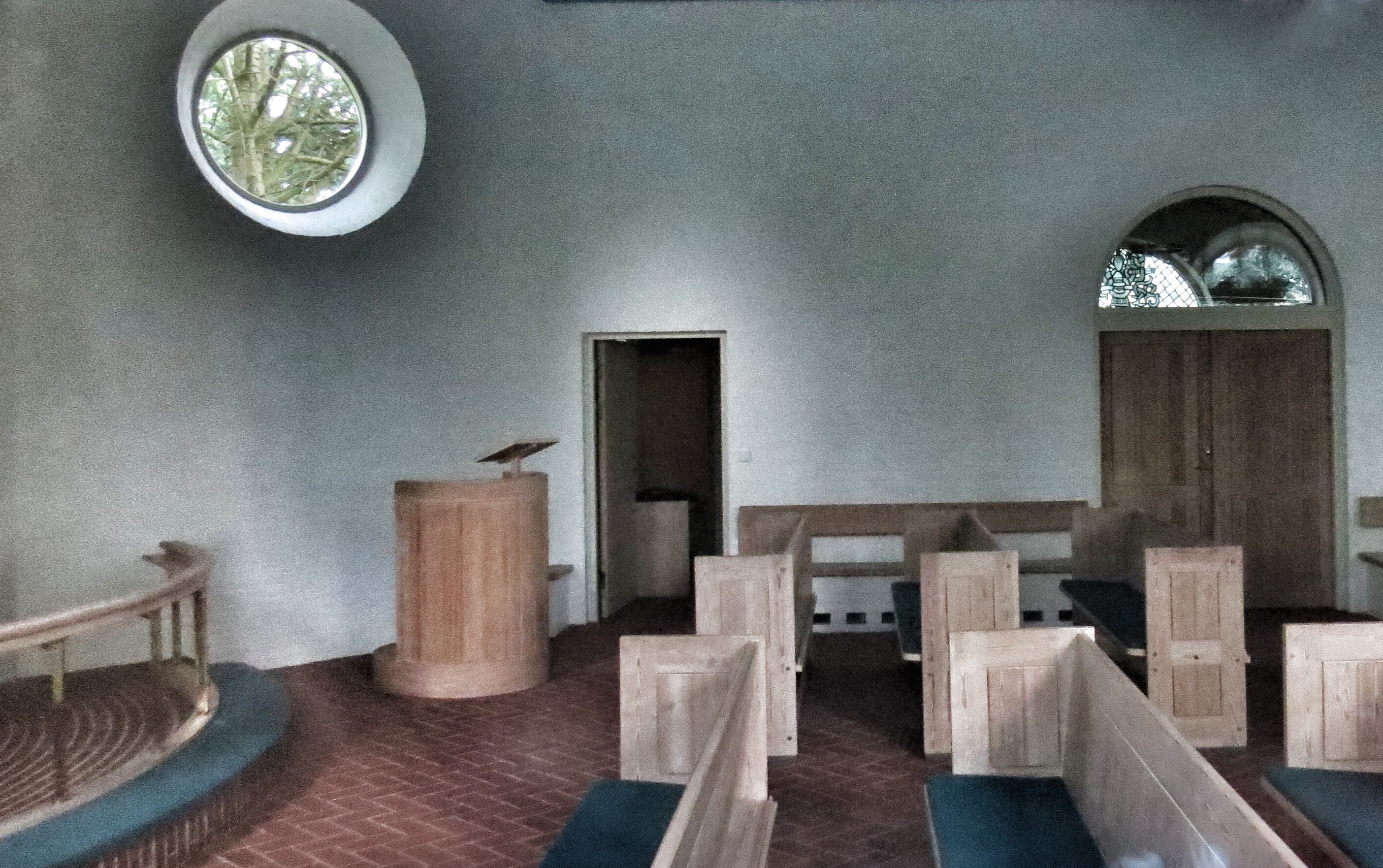 Interiør fra Danske kirke i Husum, Sydslesvig